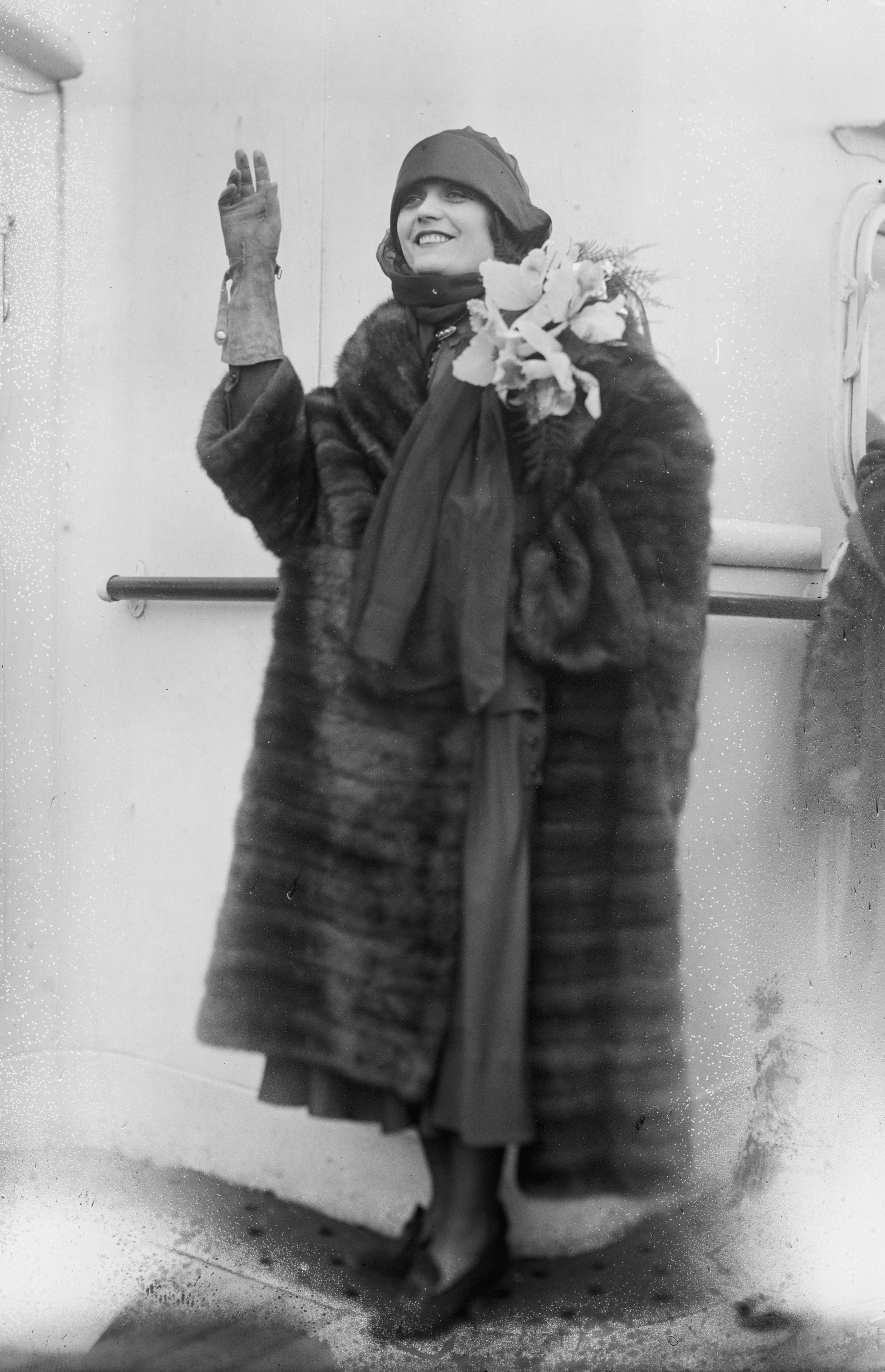 Actress Pola Negri